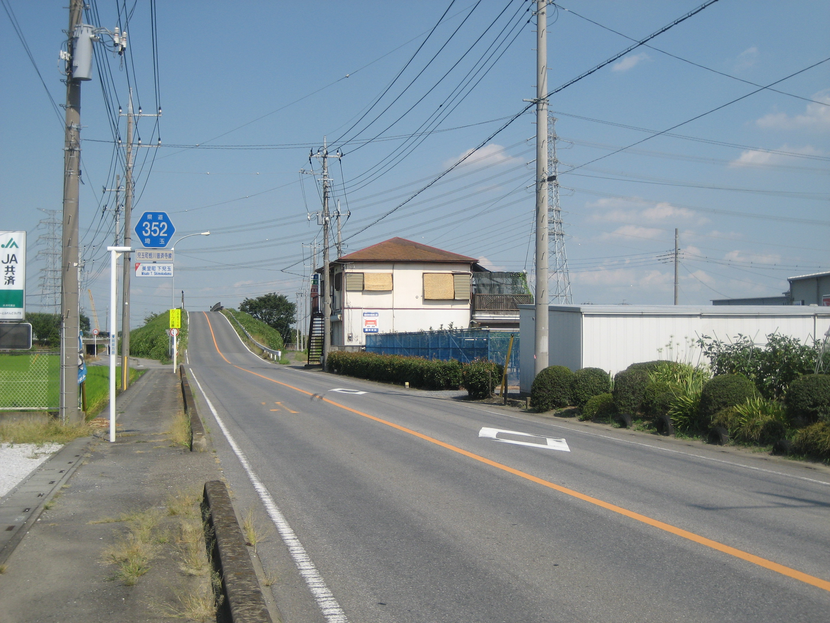 埼玉県道265号線美里町下児玉付近